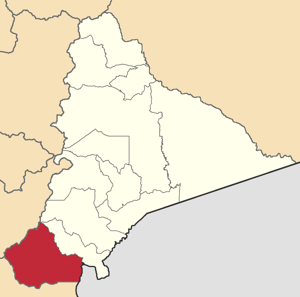 Mapa localizador del cantón en Morona-Santiago, Ecuador